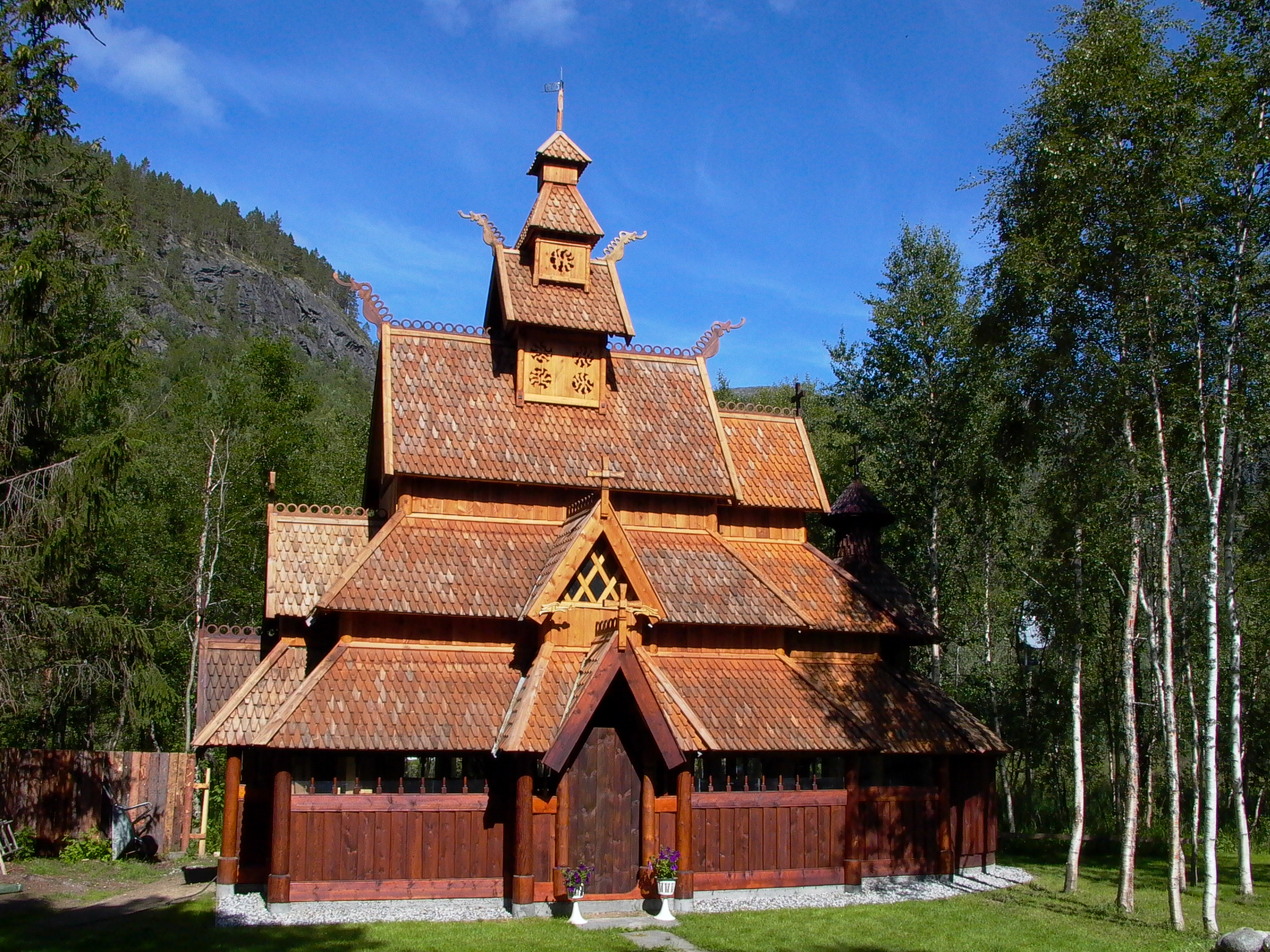 Stavkirken på Savjord i Beiarn i Norge, påbegynt våren 2005